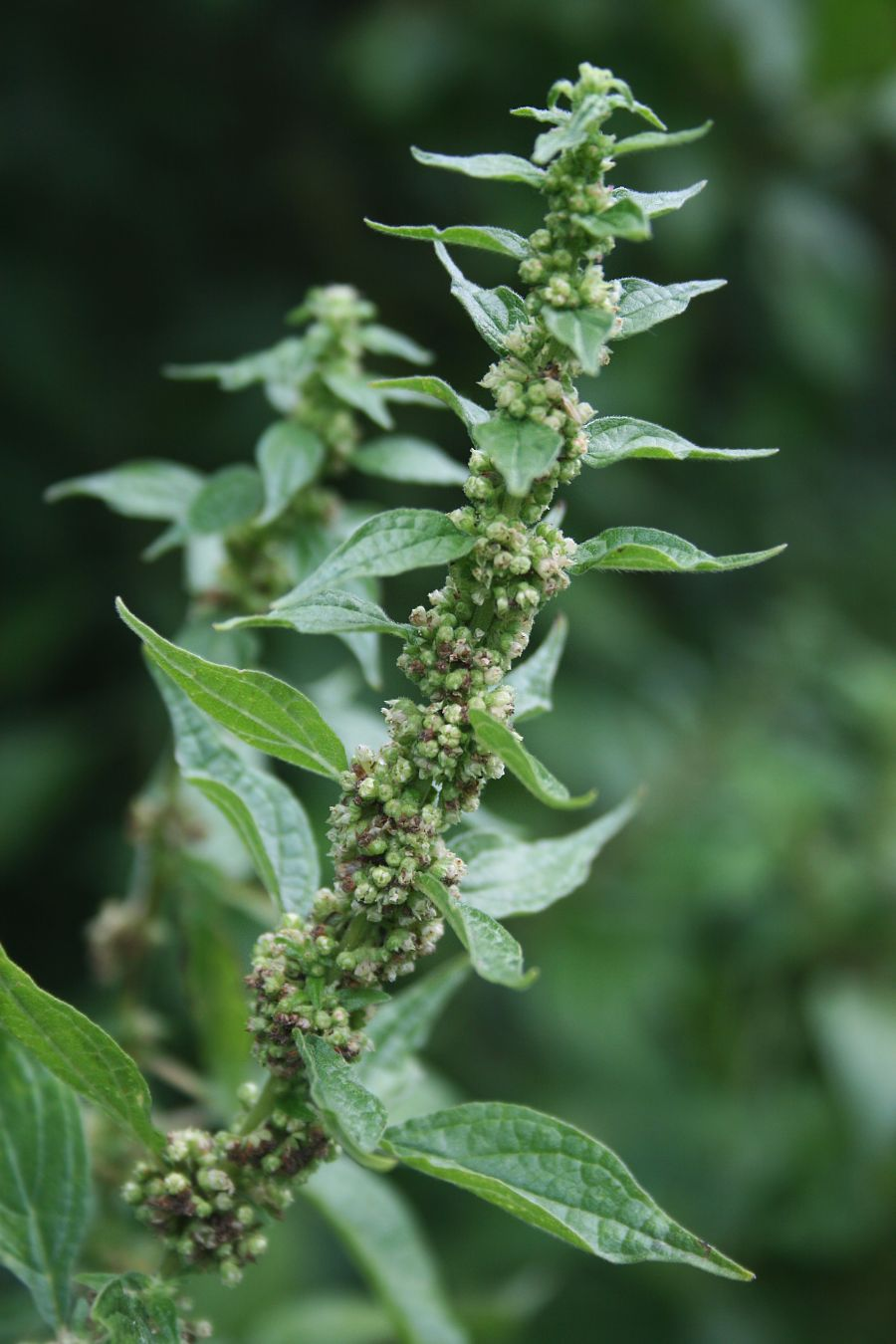 Aufrechtes Glaskraut (Parietaria officinalis), Brennnesselgewächse (Urticaceae) - Österreich/Austria/Autriche: Niederösterreich, Eichkogel S Mödling